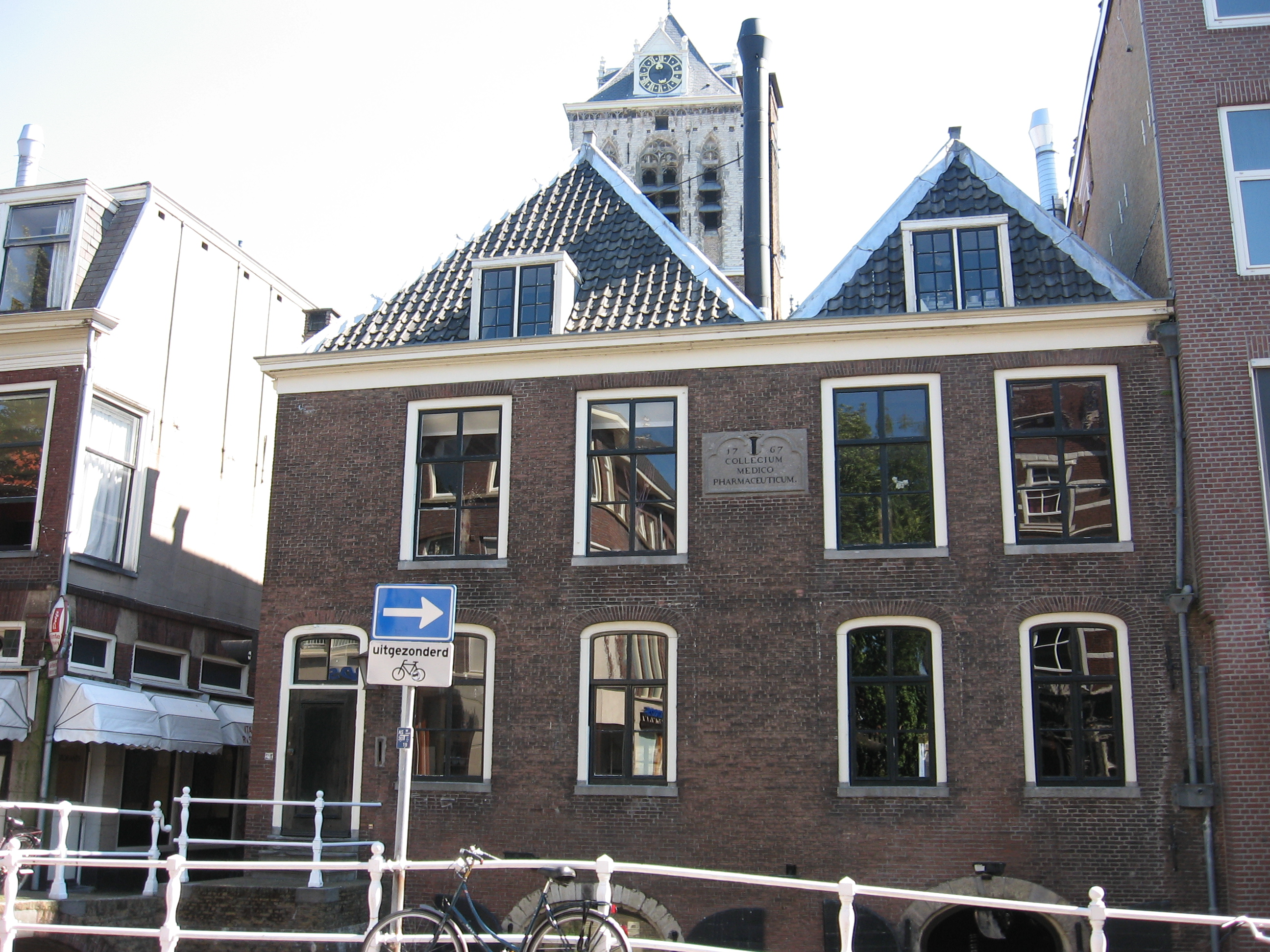 Waag, achterzijde (Wijnhaven) Delft